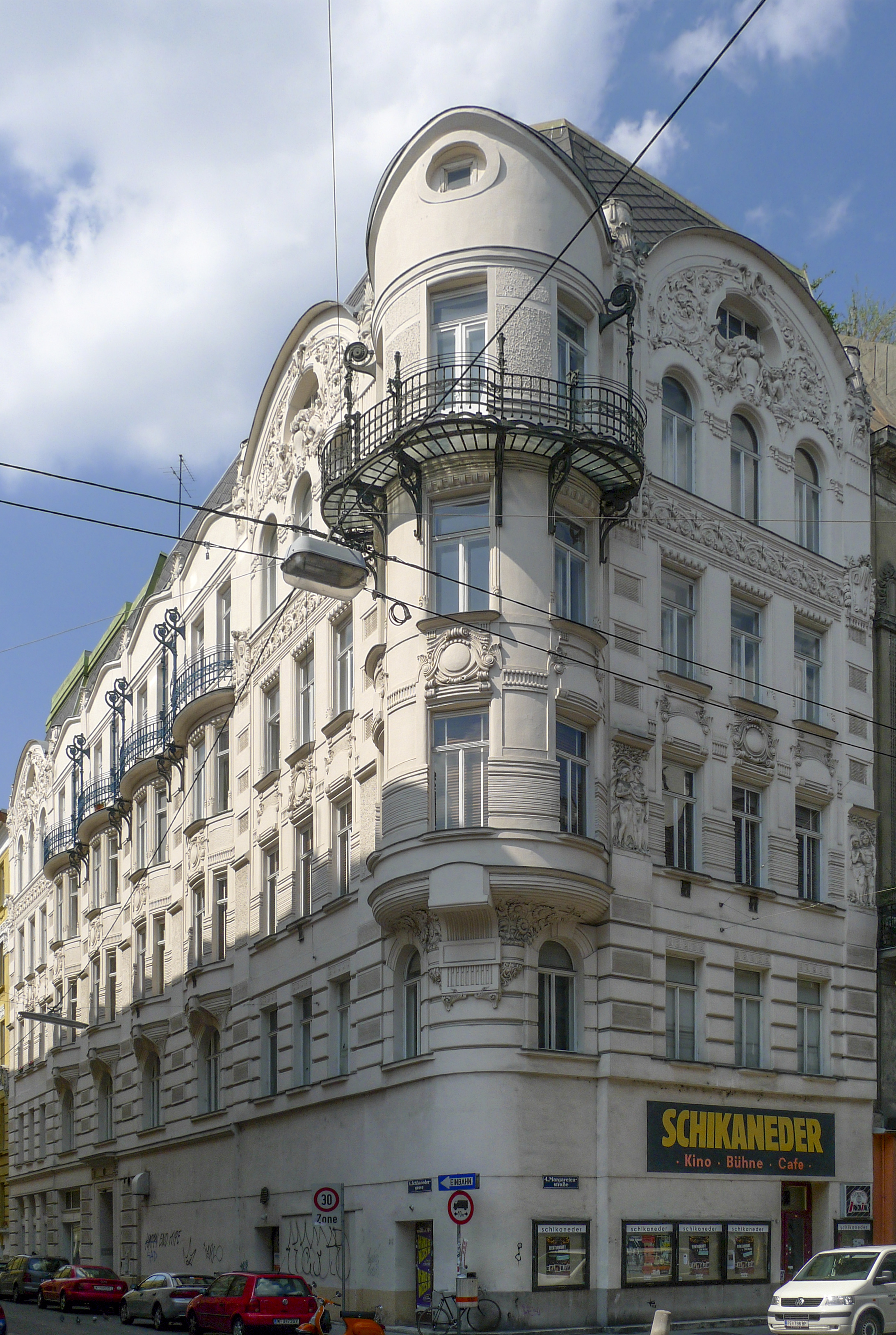 Margaretenstraße 24